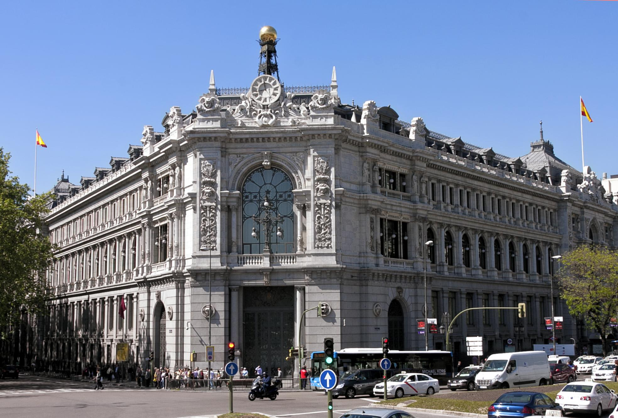 Madrid 2012_16